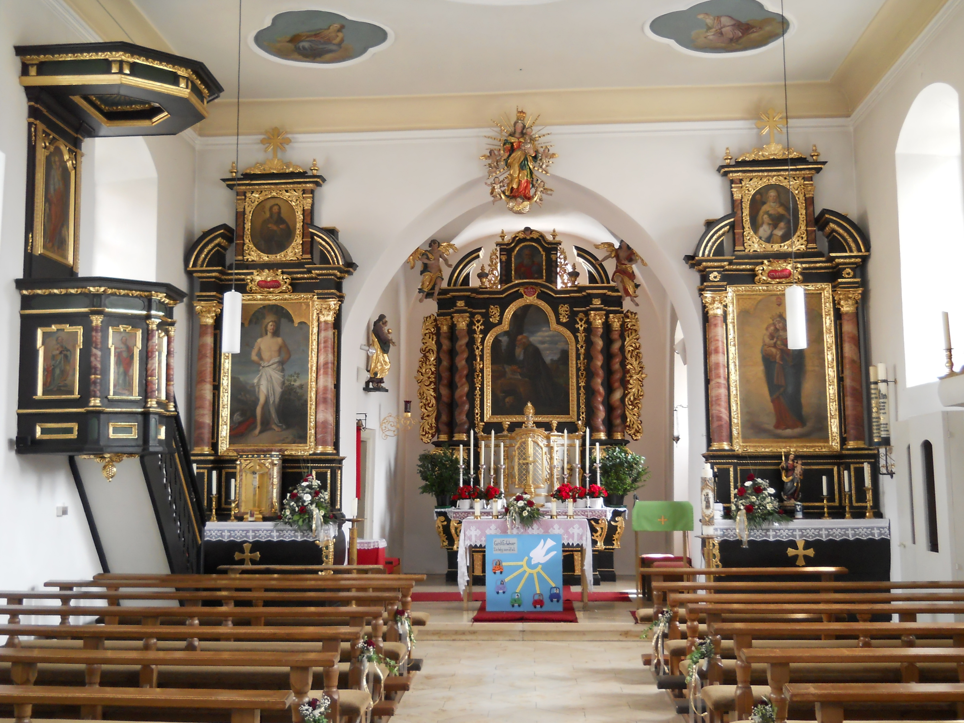 Kirche St. Ägidius in Erkertshofen im Landkreis Eichstätt/Bayern